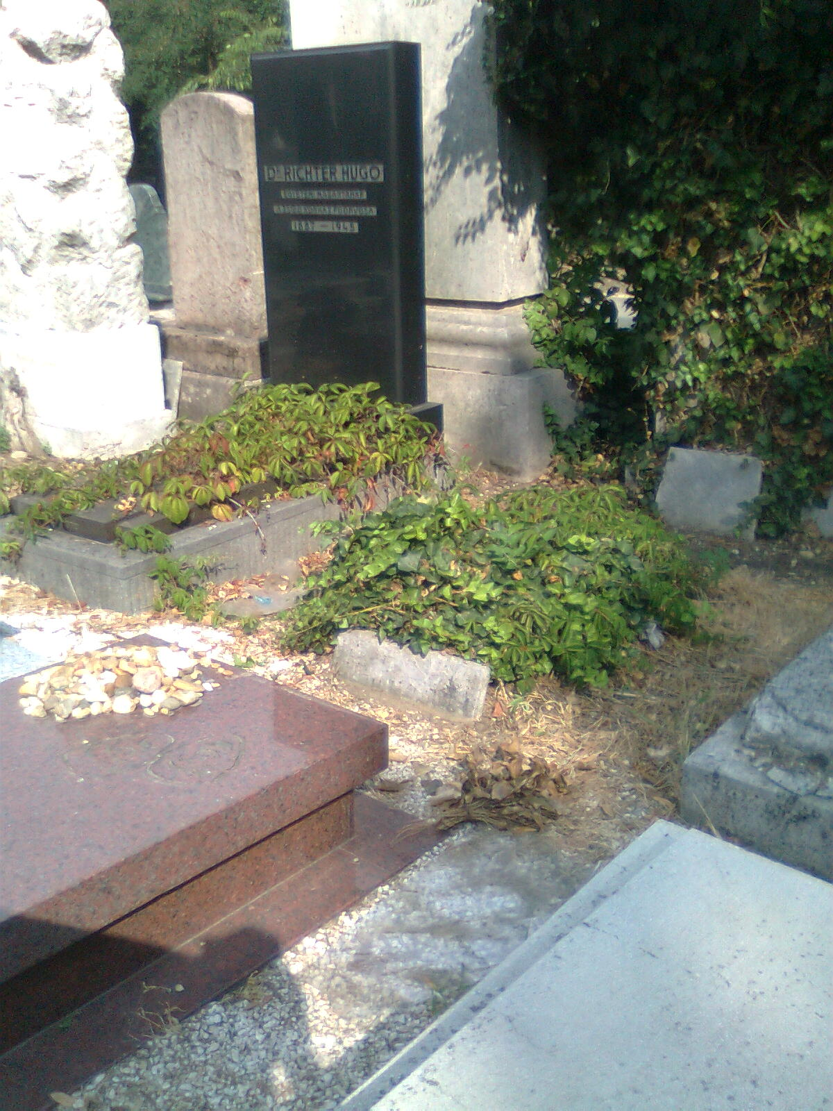 Klug Lipót matematikus sírja, középen, zöld sövénnyel befutva. Előtte földbe süllyedt kőtábla, rajta alig olvashatóan: Dr. Klug Lipót. Előtte a lila márványsír Kabos Lászlóé.- Új köztemető, Budapest